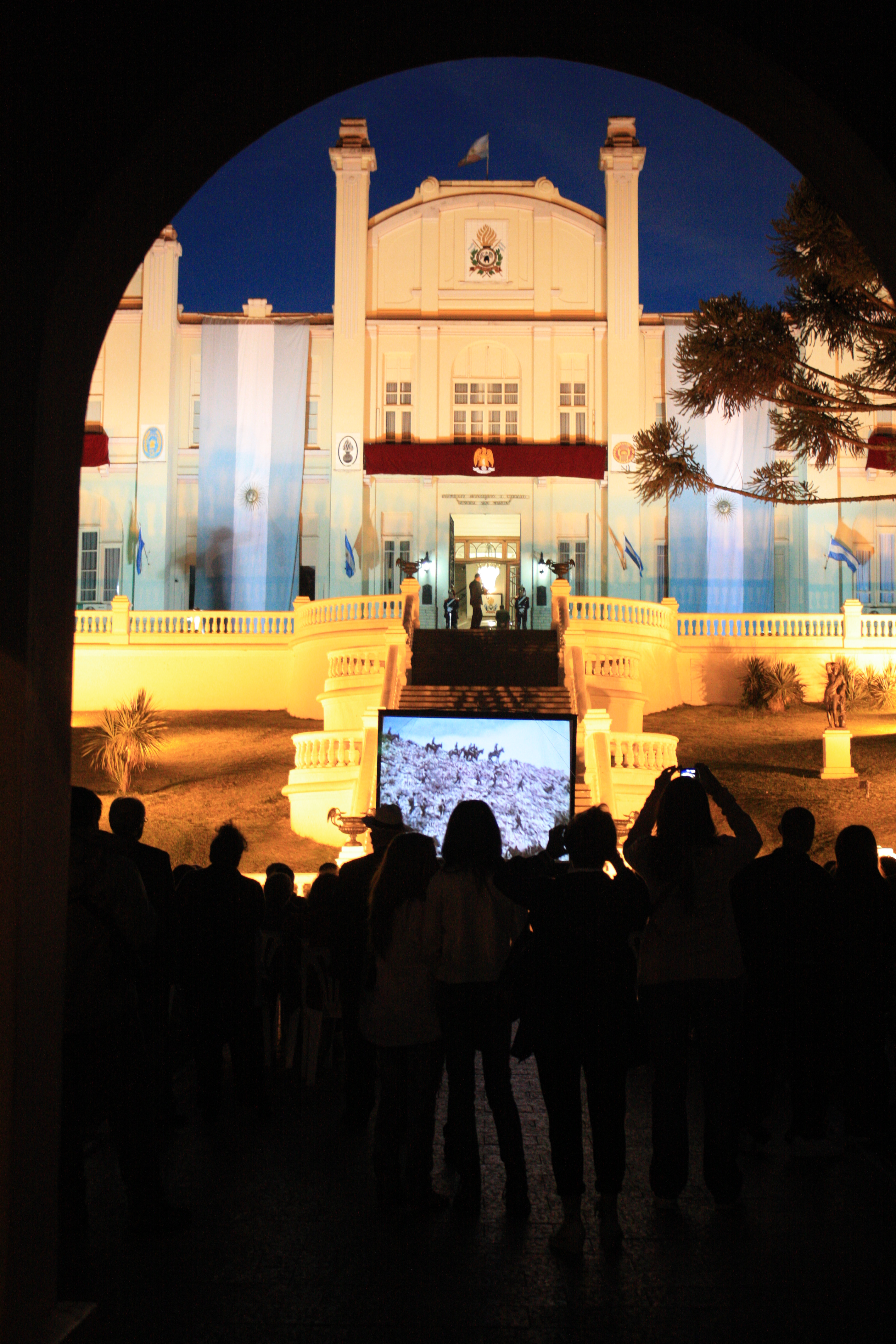 Regimiento de Granaderos a Caballo Gral. San Martín